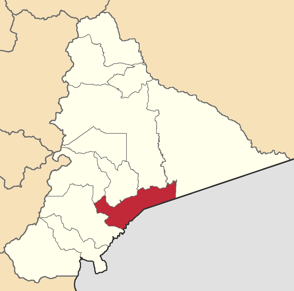 Mapa localizador del cantón en Morona-Santiago, Ecuador